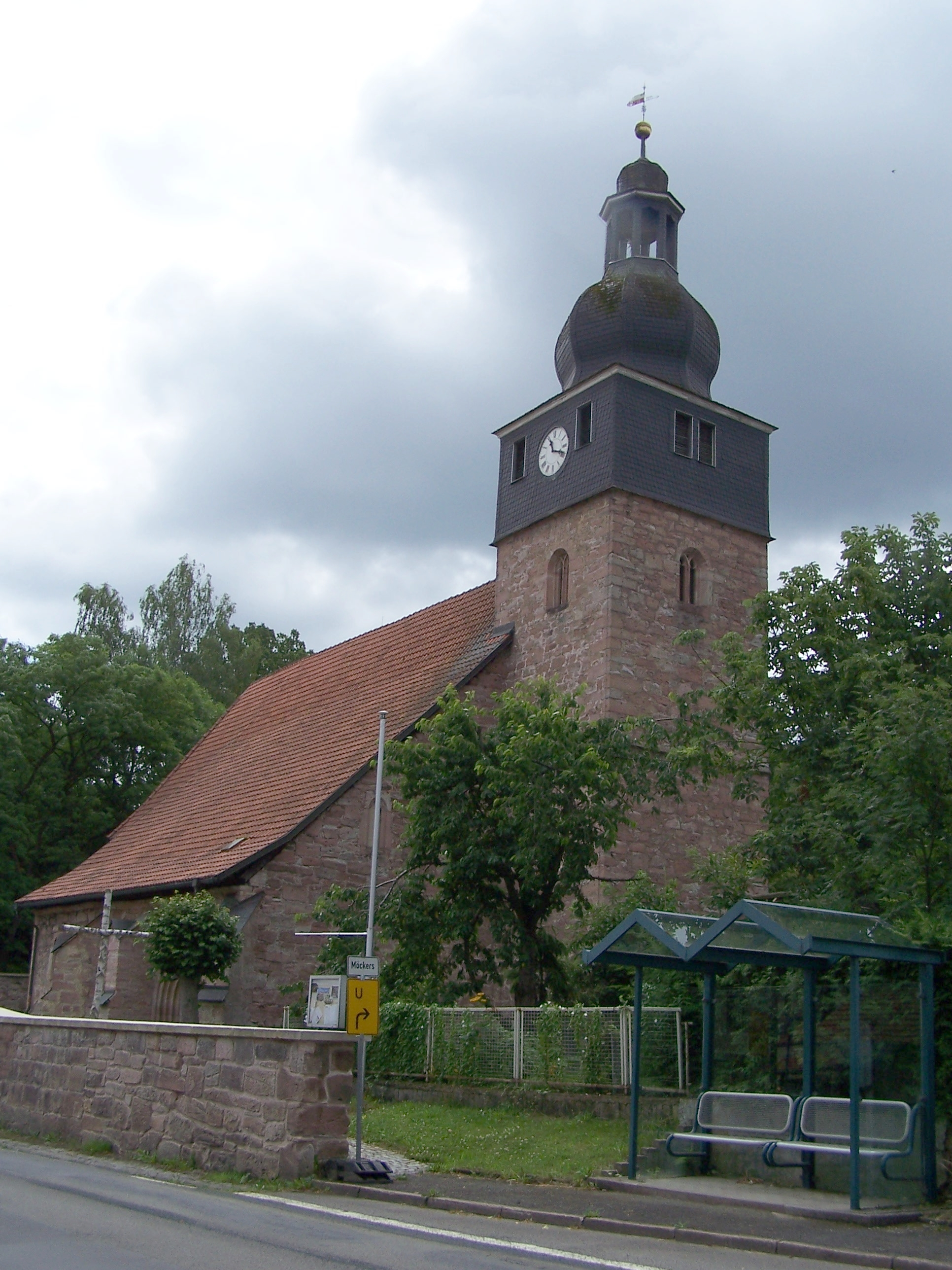 Die spätgotische Dorfkirche von Haindorf ist Pfarrkirche für die Stadtteile Aue, Volkers, Mittelschmalkalden und Haindorf. Ansichten und Details.